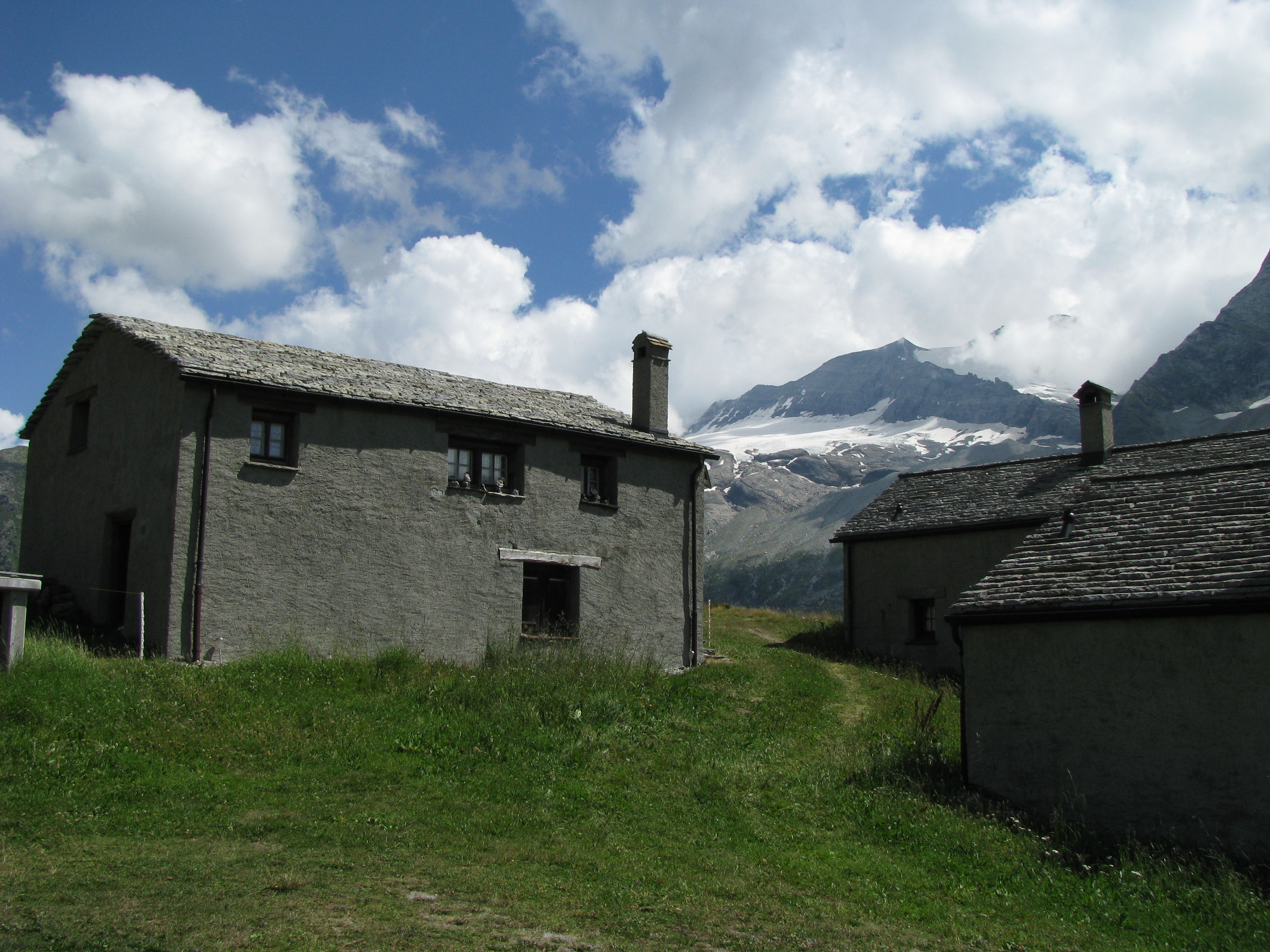 Alpe Hopsche